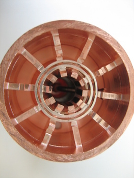 Aufgesägtes Magnetron